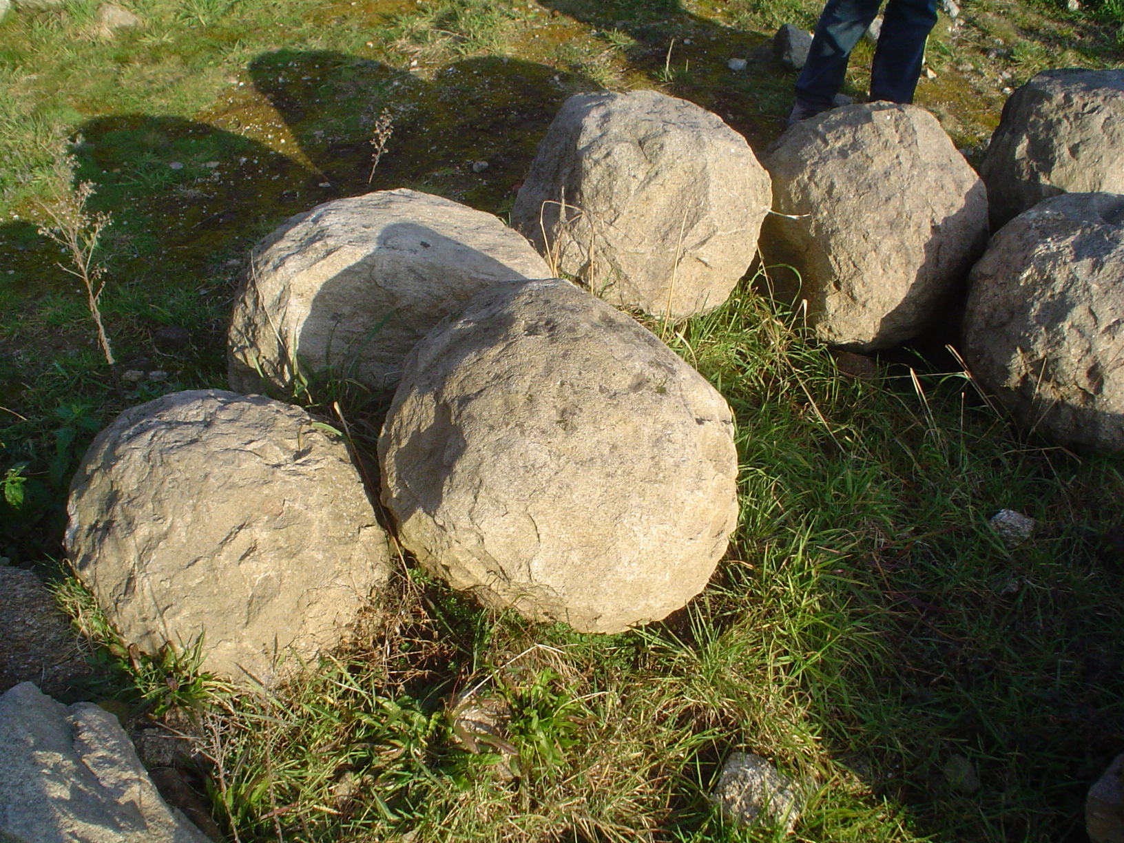 Proxectiles de catapulta do Castelo da Rocha Vella en Santiago de Compostela na parroquia de Vidán.